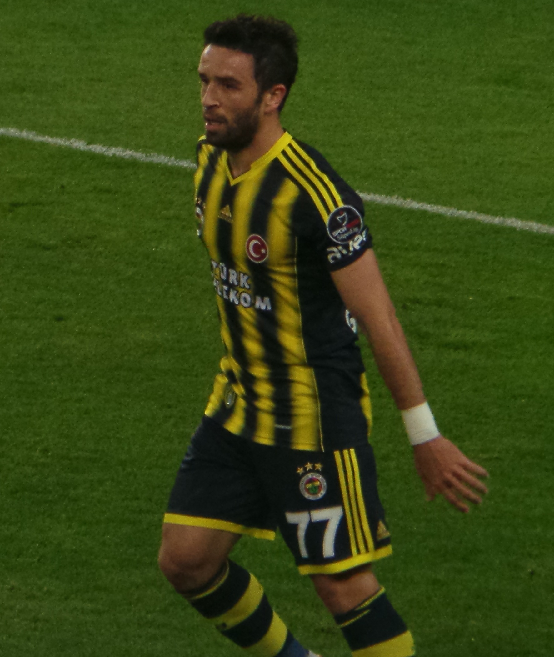 Gökhangönül